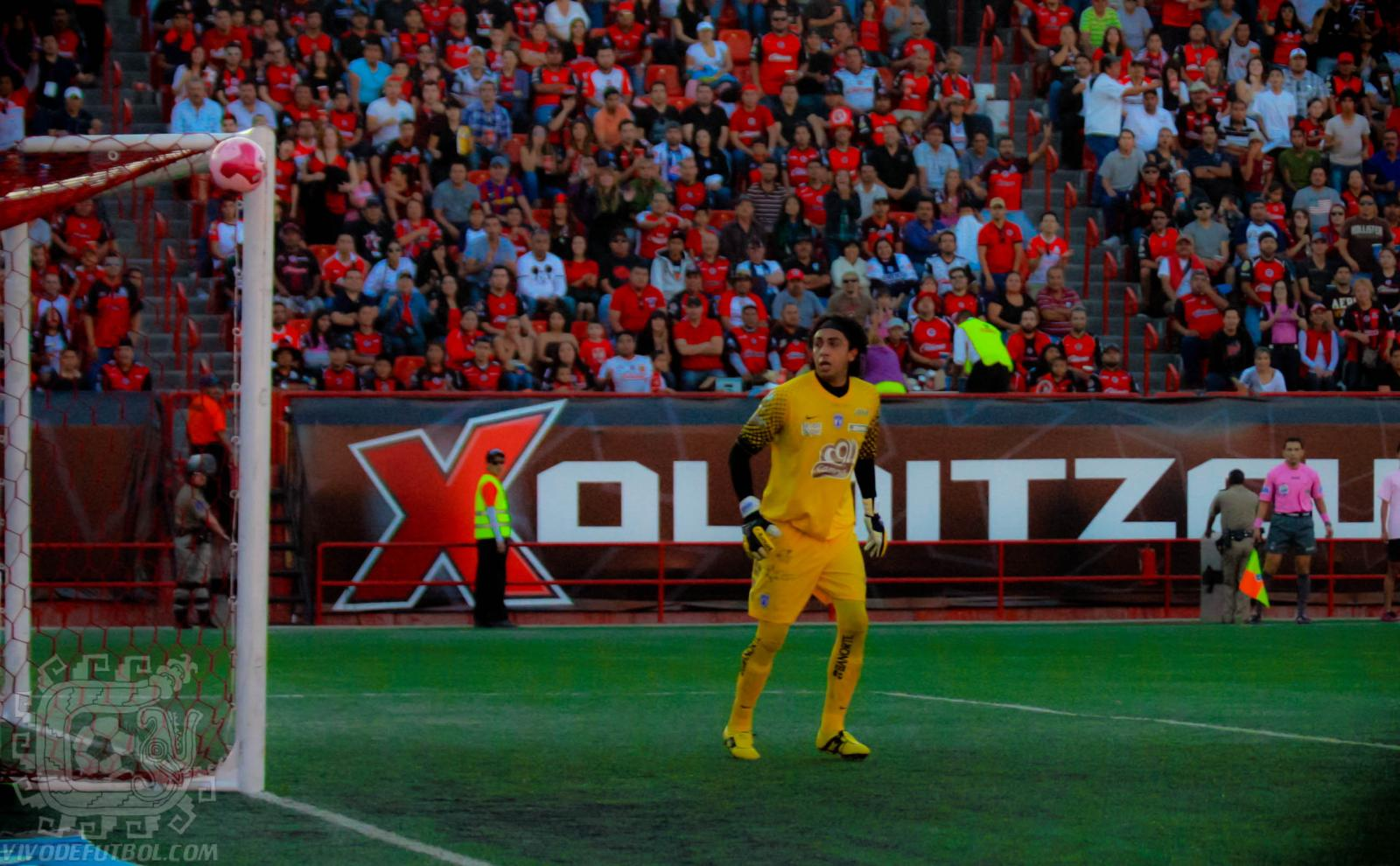 xolos vs pachuca match